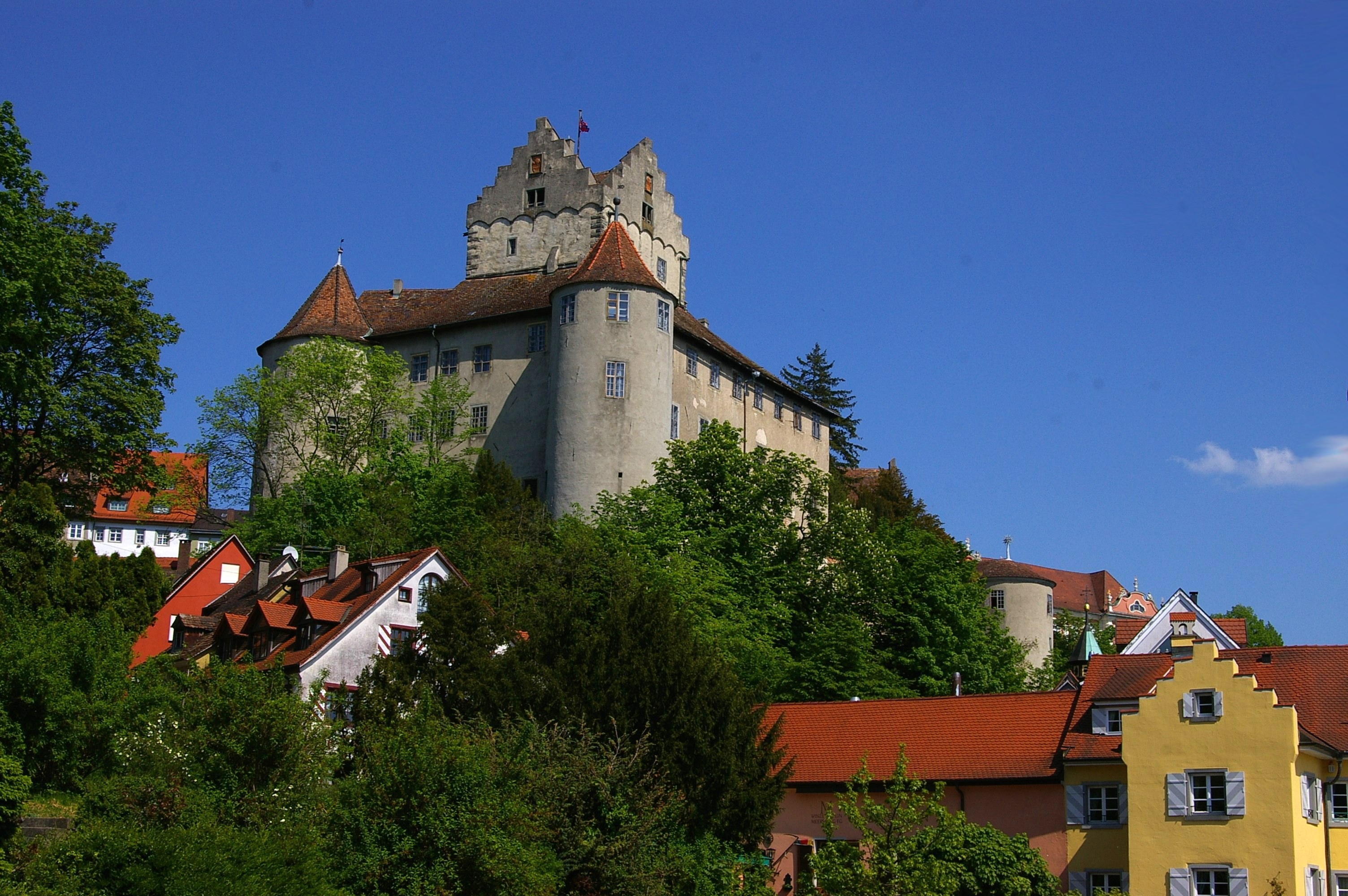 Meersburg - altes Schloss / Burg Meersburg von der Hafenseite her gesehen